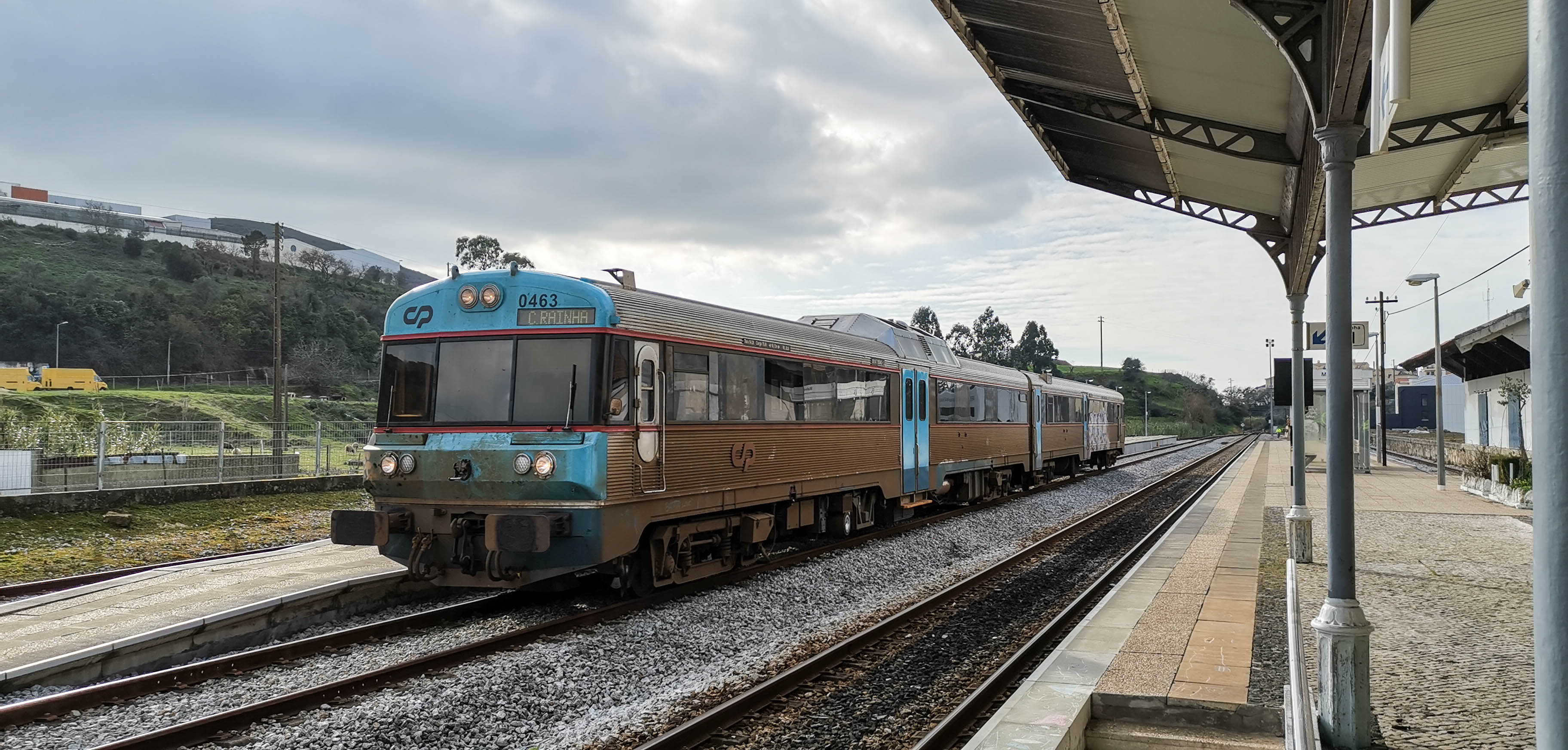 UDD 0463 com o regional 6411 (Mira Sintra-Meleças – Caldas da Rainha).